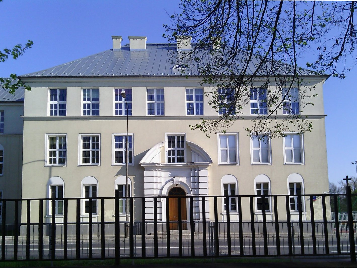 Szkoła podstawowa nr 206 w Warszawie, ul. Bartnicza 2.